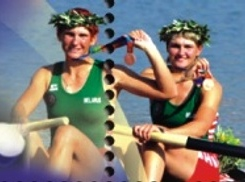 Natallia Helakh and Yuliya Bichyk